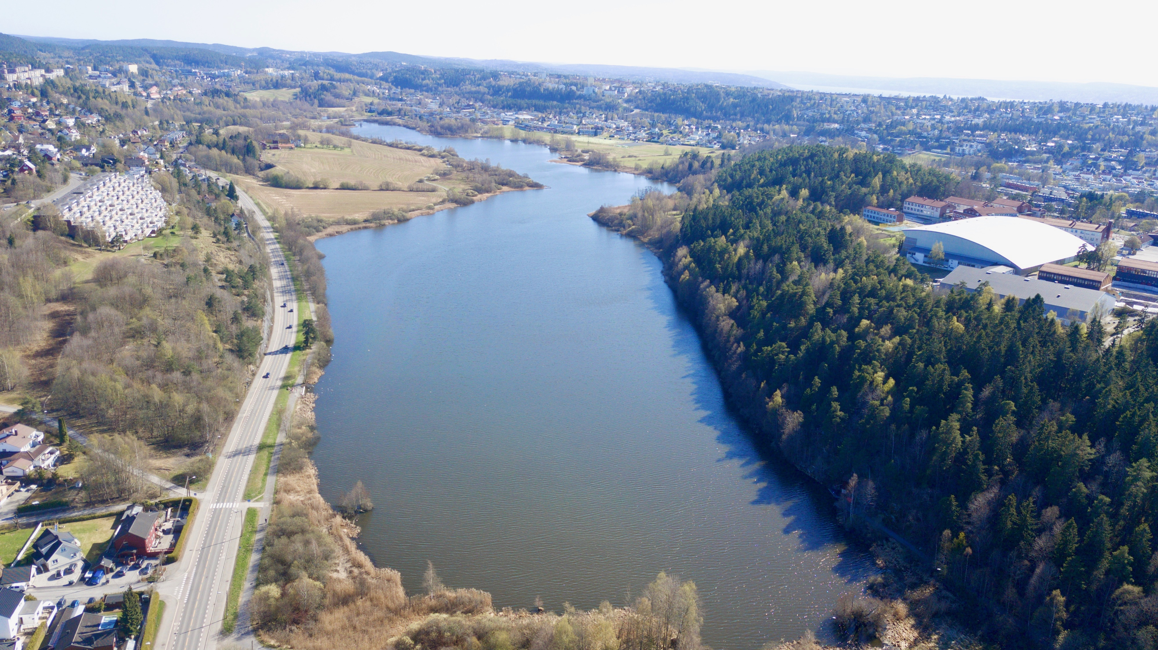 Østensjøvannet i Oslo.